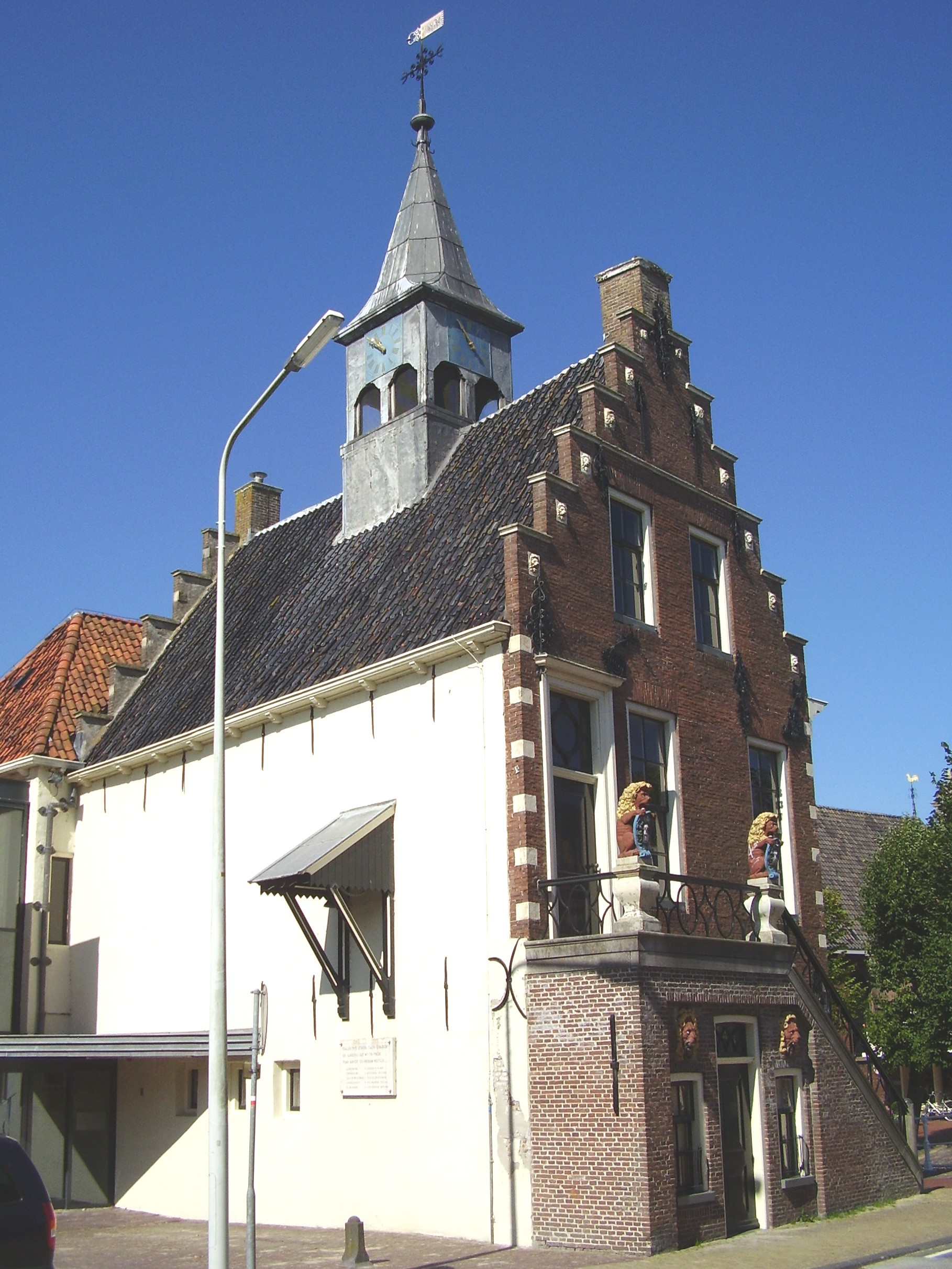 Raadhuis van Gaasterlân-Sleat in Balk (provincie Friesland, Nederland)